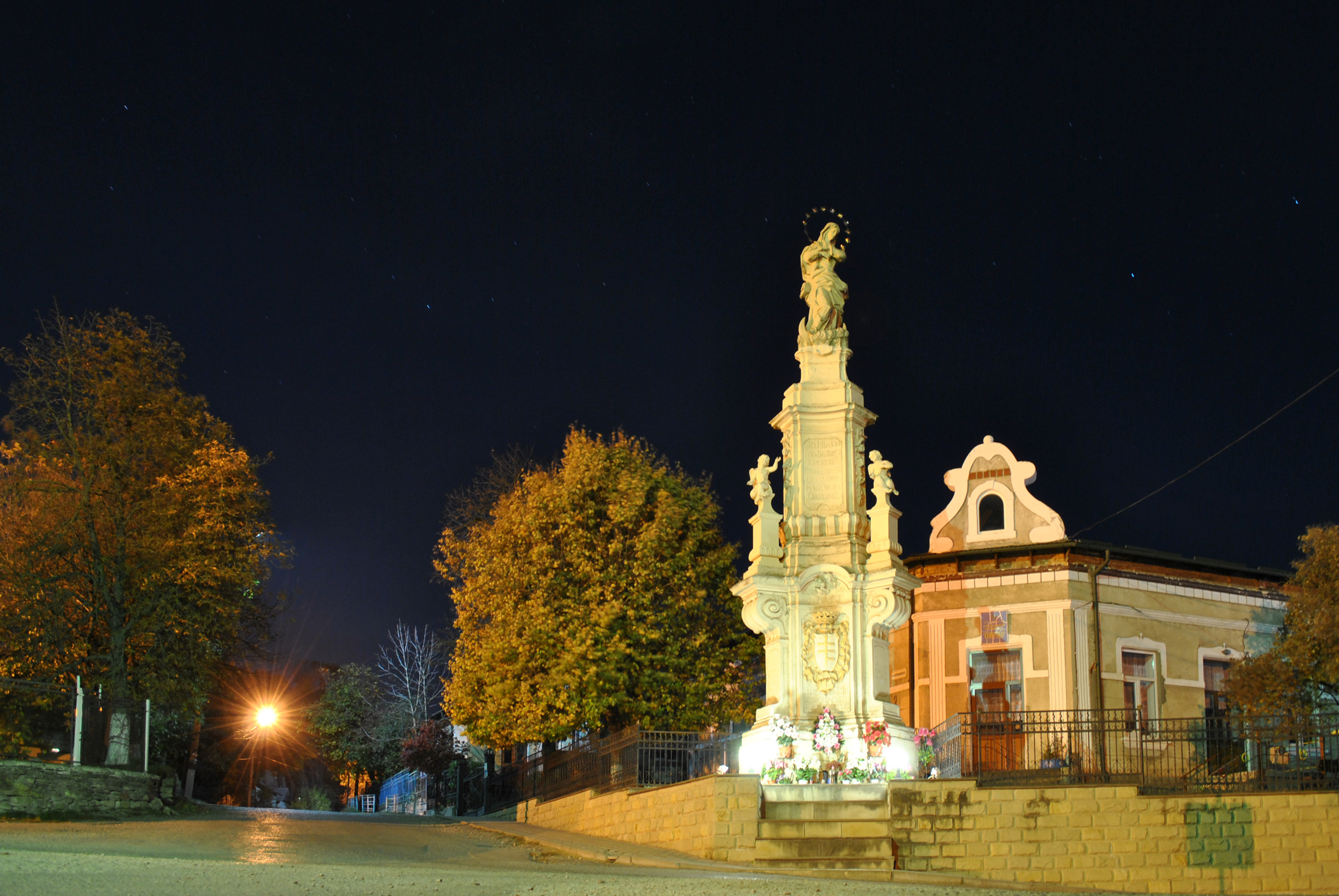 Скульптура Матері Божої в Бучачі Тернопільської області на вул. Б. Хмельницького, 2, біля дитсадку «Сонечко» (неподалік художньої школи)